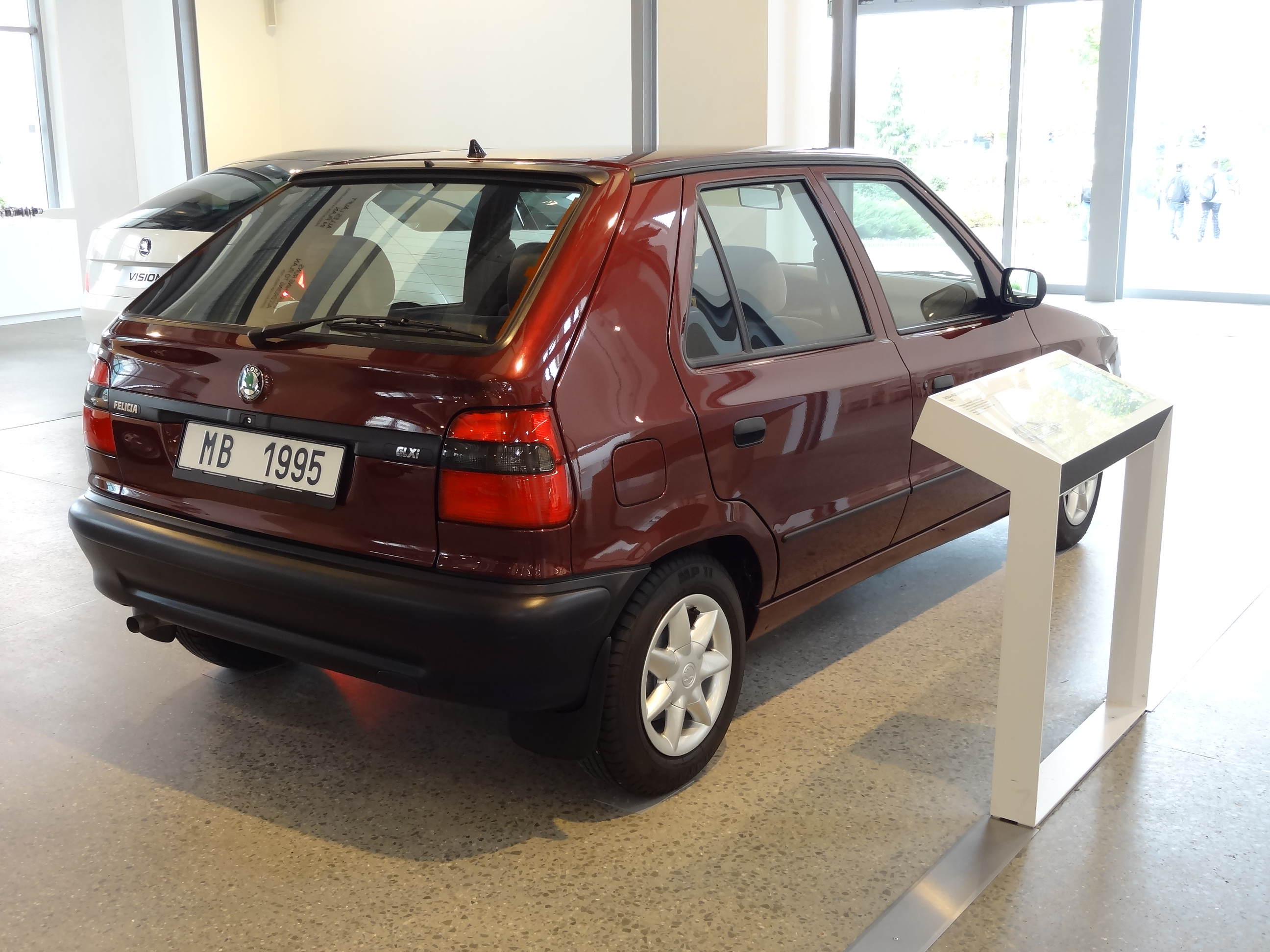 "Das erste Kind aus der Ehe von Skoda und VW wird auf der Prager Karlsbrücke auf den Namen Felicia getauft. Der Nachfolger des Favorit, in nur drei jahren entwickelt, findet reißenden Absatz im In- und auch im Ausland. Zwei Drittel der Produktion gehen in den Export." (Hinweistafel)